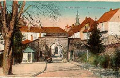 Image de Bitche : porte de Strasbourg.